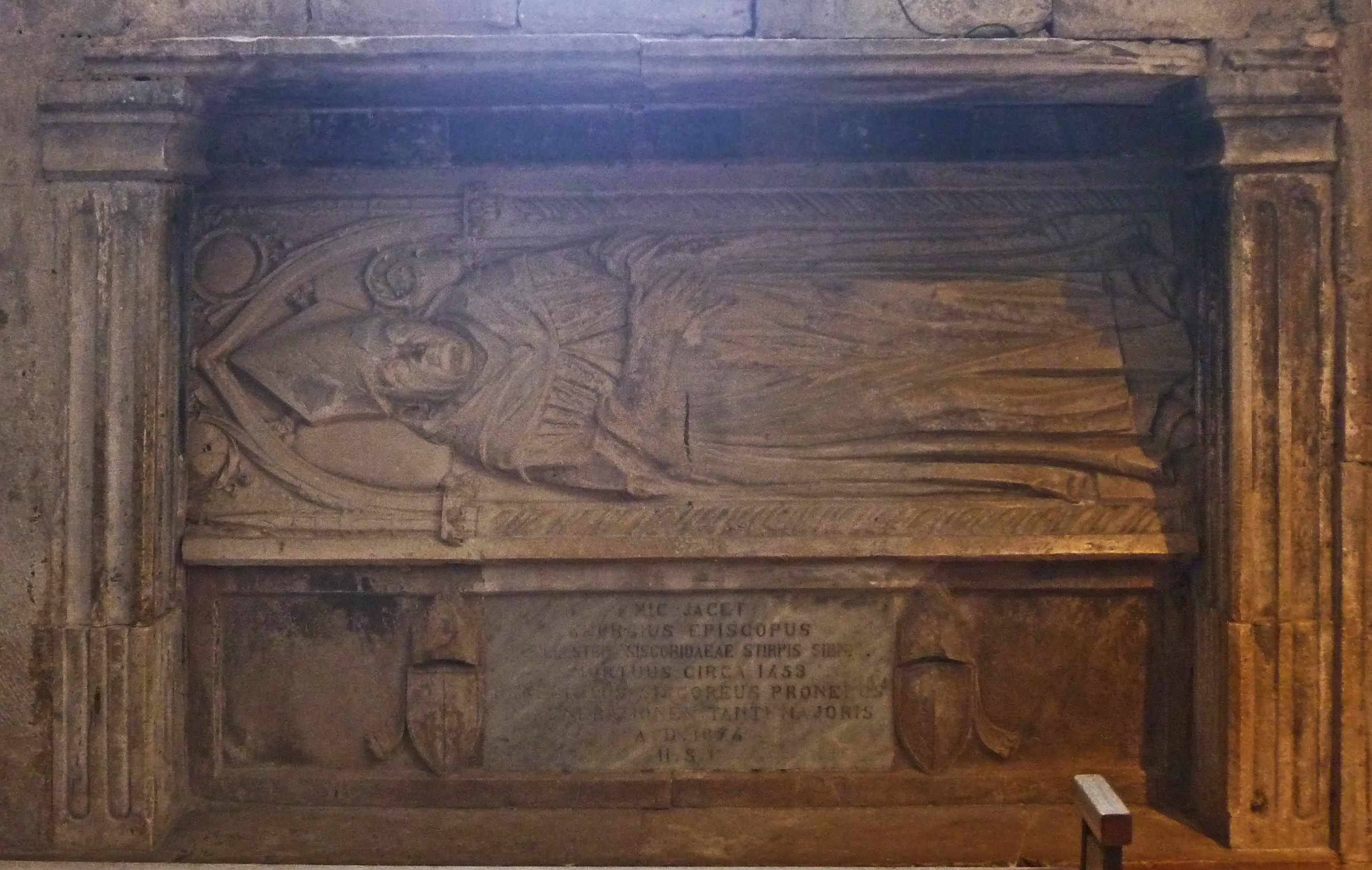 Grabmal des Juraj Šižgorić (1445–1509)(lat.: Georgius Sisgoreus oder Georgius Sisgoritus, Bischof, Humanist und Schriftsteller) in der Kathedrale des hl. Jakob in Šibenik von Andrija Aleši, Entwurf von Juraj Dalmatinac.